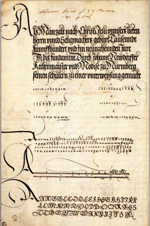 Johann Neudörffer der Ältere, Titelblatt zu Fraktur 1519